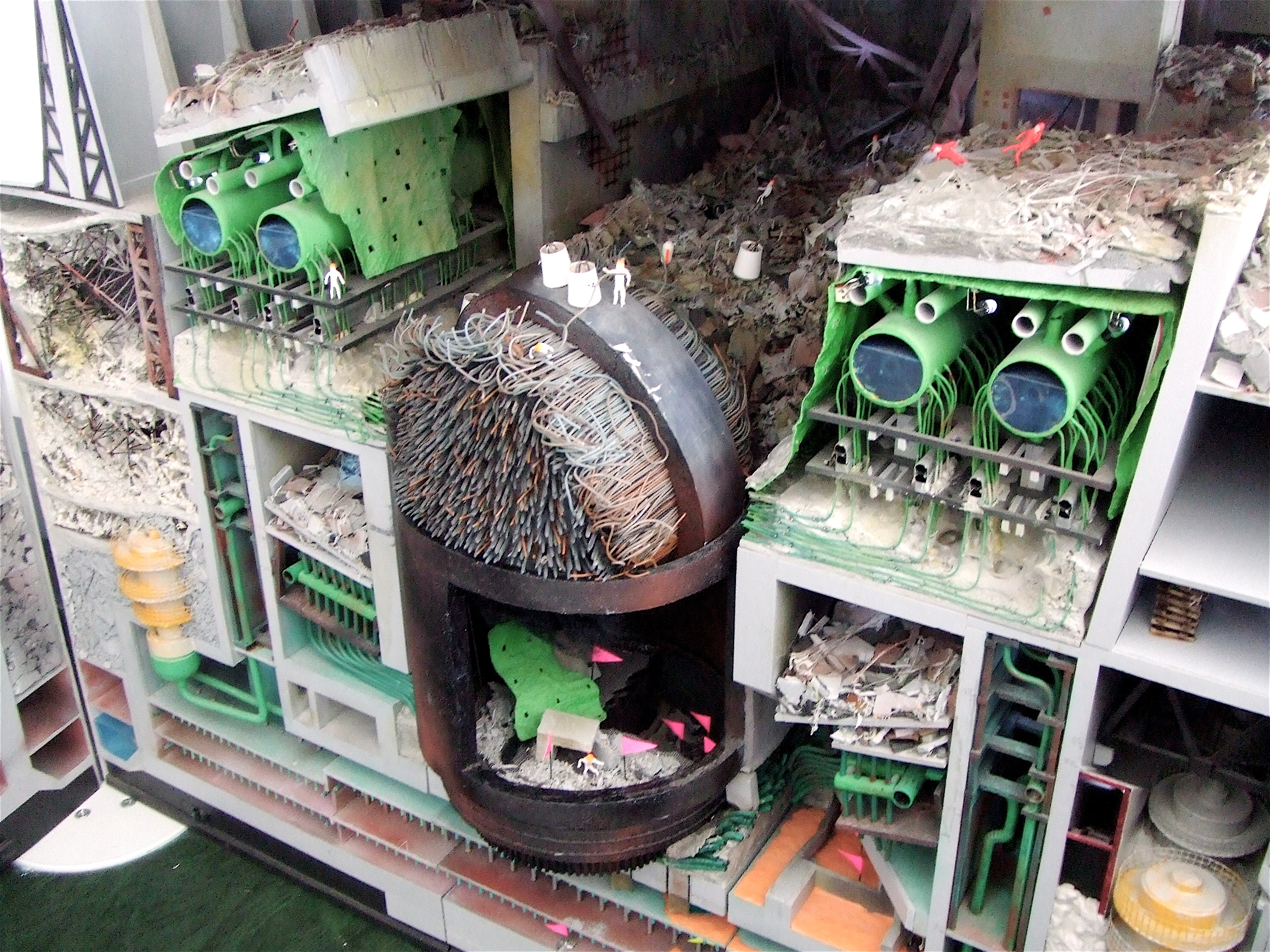 A csernobili atomerőmű felrobbant 4-es reaktorának makettje (kiállítás Csernobilban)